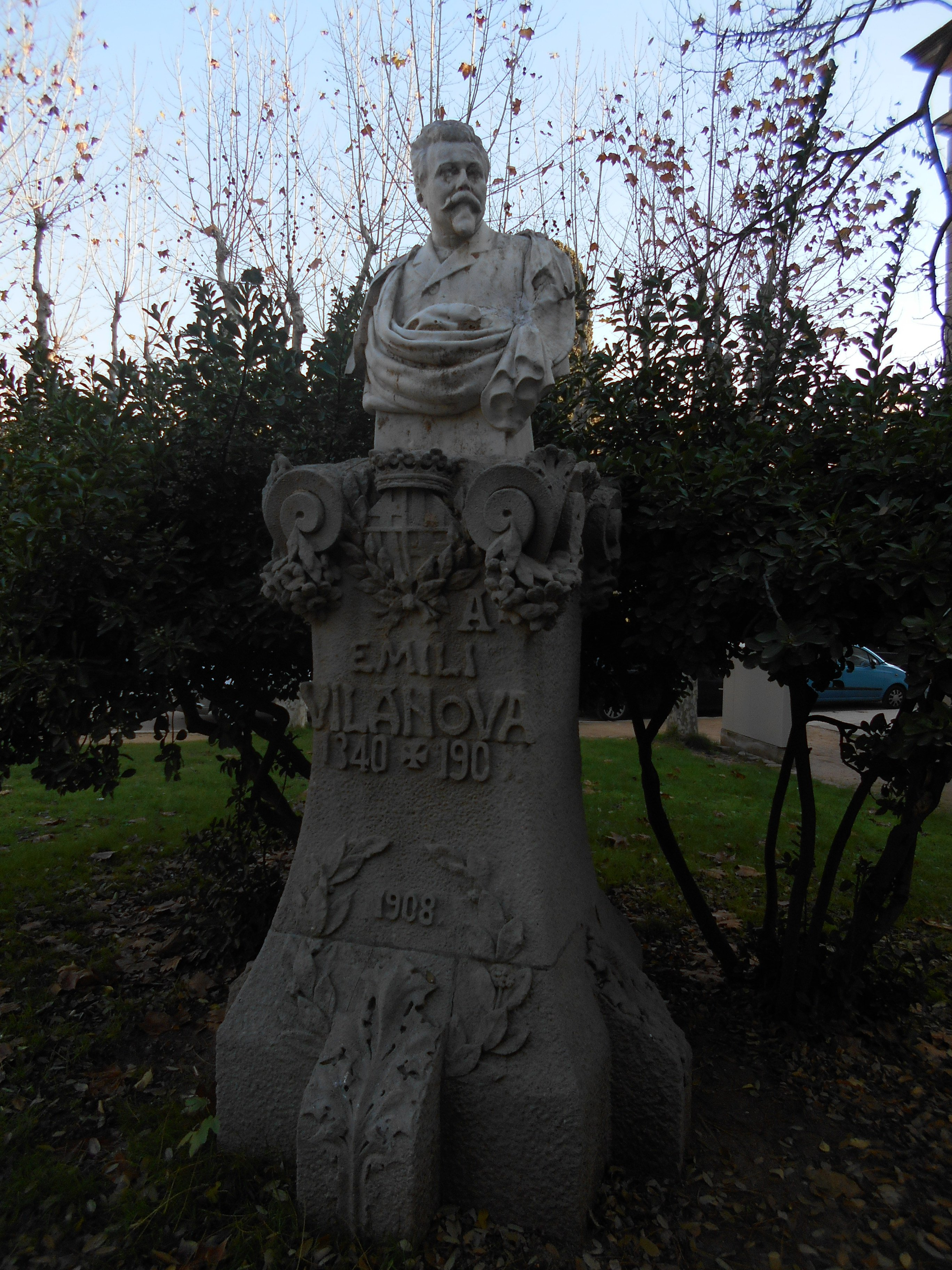 A Emili Vilanova (Pere Carbonell).